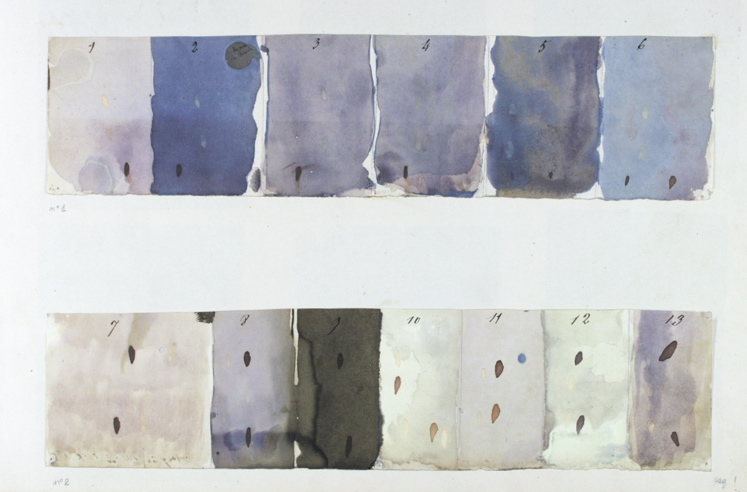 Résultats de l'exposition de plusieurs papiers à la lumière naturelle